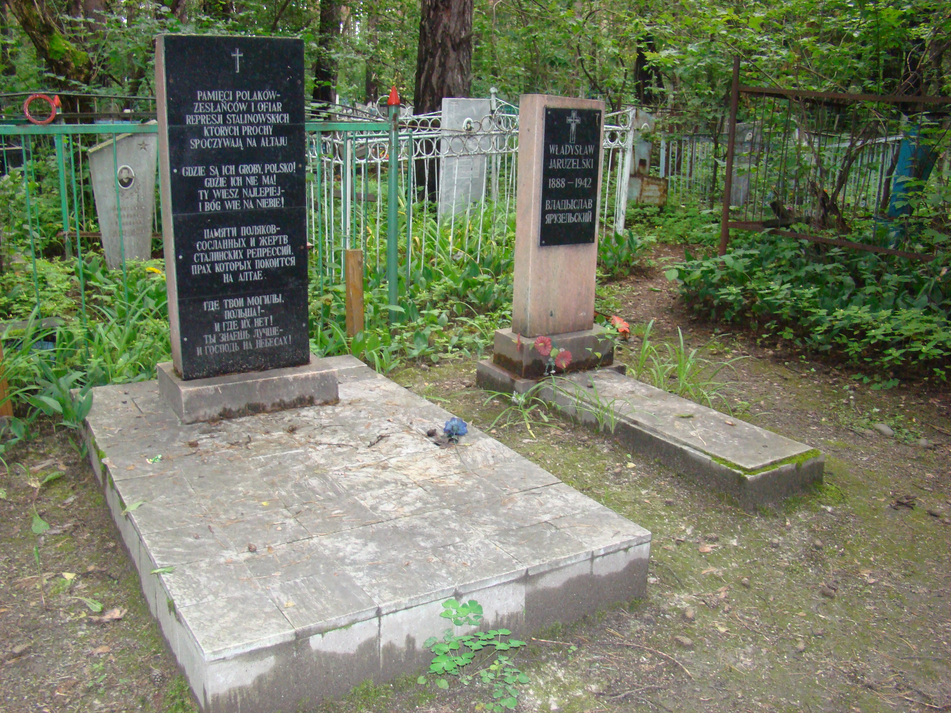 Mogiła Polaków- zesłańców i ofiar represji stalinowskich, których prochy spoczywają na Ałtaju oraz grób Władysława Jaruzelskiego w Bijsku, cmentarz w Bijsku, Kraj Ałtajski, Rosja.